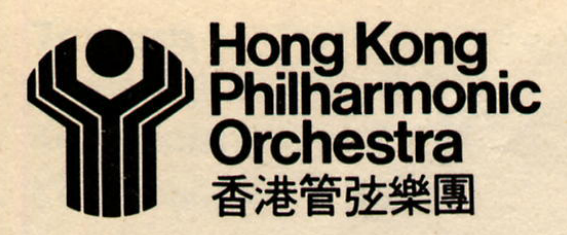 港樂第一代標誌